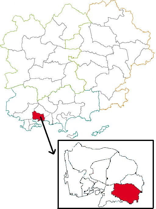 Situation du canton dans le département du Var (83), France